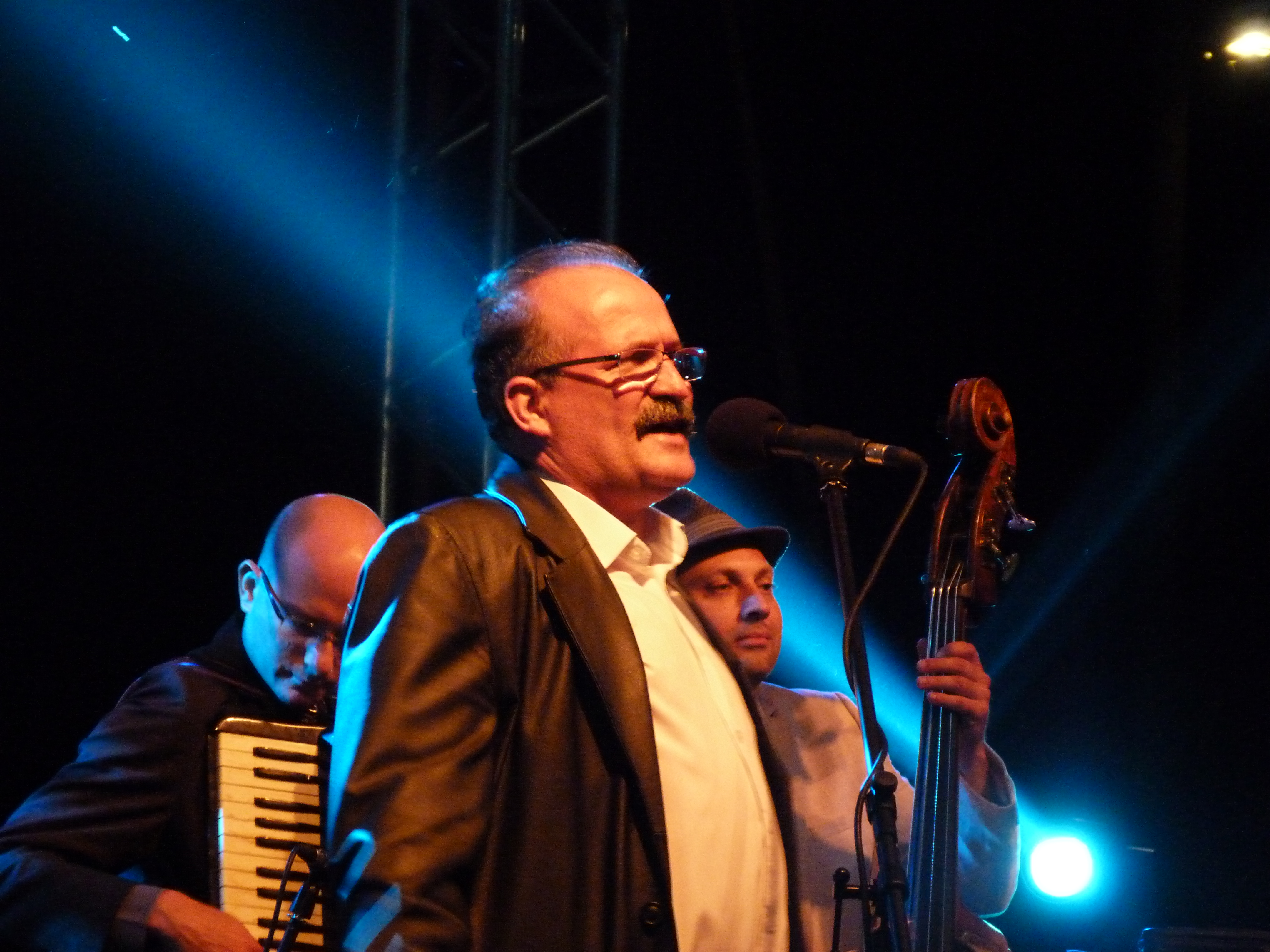 A felvétel 2014. augusztus 6-án készült Nagyharsányban. Focipálya. A Csík Zenekar koncertje. ©© Derzsi Elekes Andor, Budapest, 2014, A kép és filmfelvételek egészben, vagy részletekben másolását, bármilyen úton történő sokszorosítását és felhasználását a szerző ellenérték nélkül, jogutódjaira is kihatóan megengedi. Az engedély kiterjed a kereskedelmi célú hasznosításra is. Kéri azonban nevének feltüntetését a felhasználás során. A Metapolisz sorozat valamennyi képe és filmje Creative Commons alatti valamint kereskedelmi - for profit - célra is felhasználható. Ajánlott hivatkozás: Derzsi Elekes Andor: Metapolisz DVD line